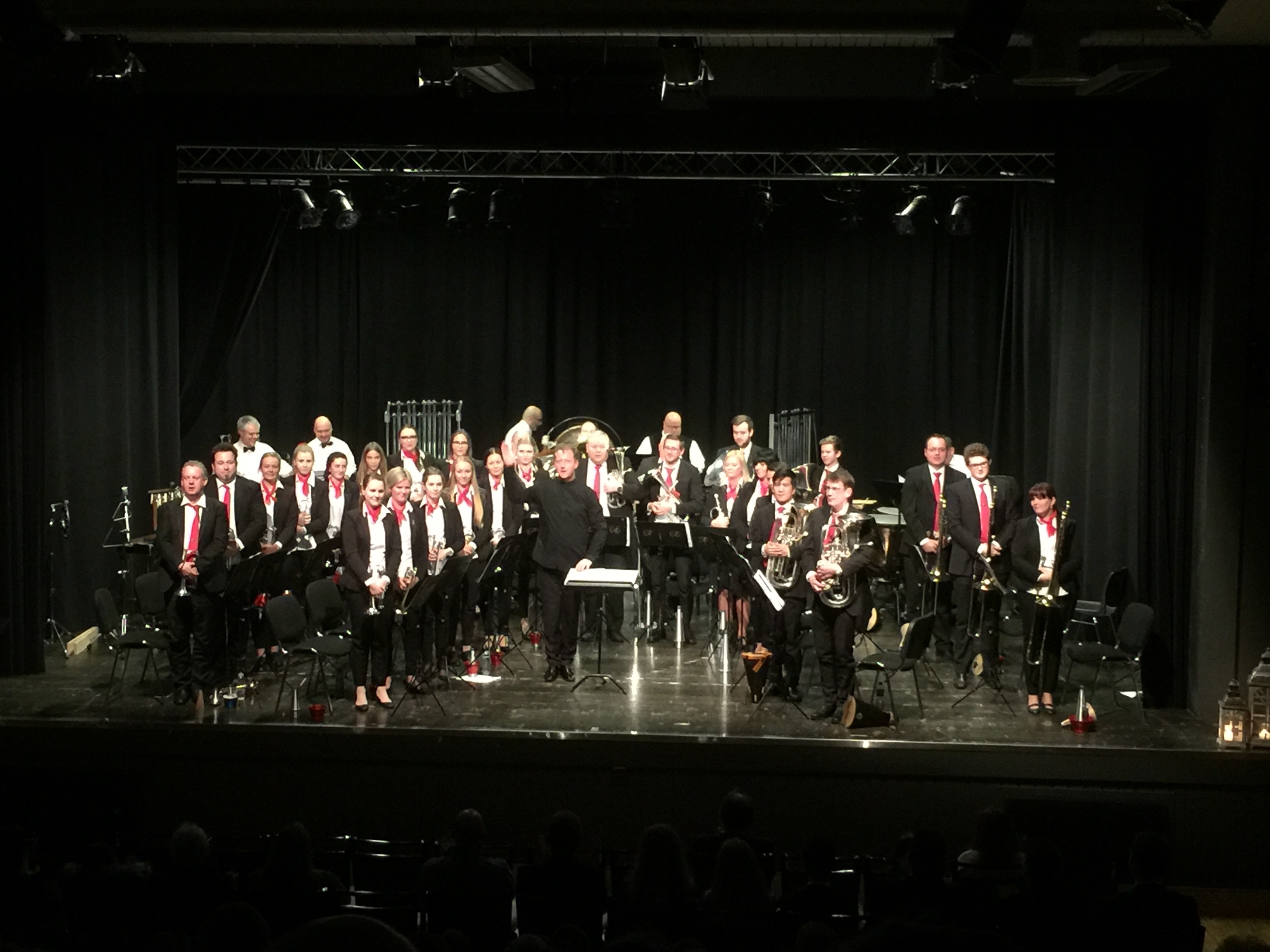 Tomra Brass Band